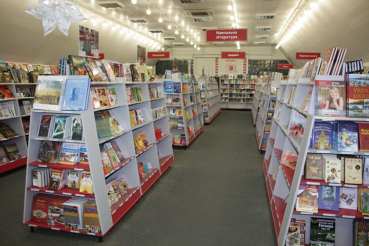 Магазин "Читайка", Київ